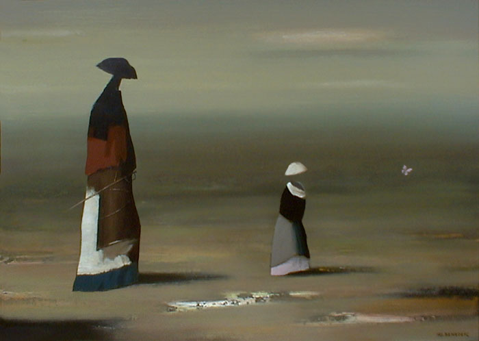 Ifjabb Benedek Jenő (Csongrád, 1939. június 13.– 2019. augusztus 20.) festőművész alkotása: Kíséret, 1998, olajfestmény, 70x100 cm